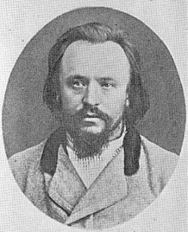 Sergej Kovalik (1846-1926)